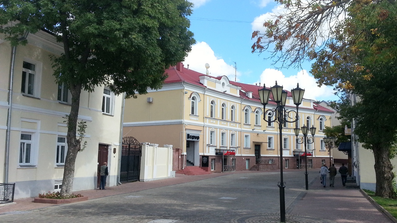 Беларуская (тарашкевіца): Забудова вул. Талстога. г. Віцебск This is a photo of Belarusian heritage monument. Reference number: 213Г000087 ( WLM)